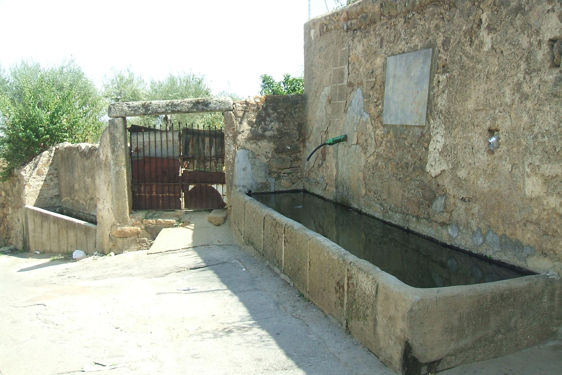 Alcuéscar abrevadero 1